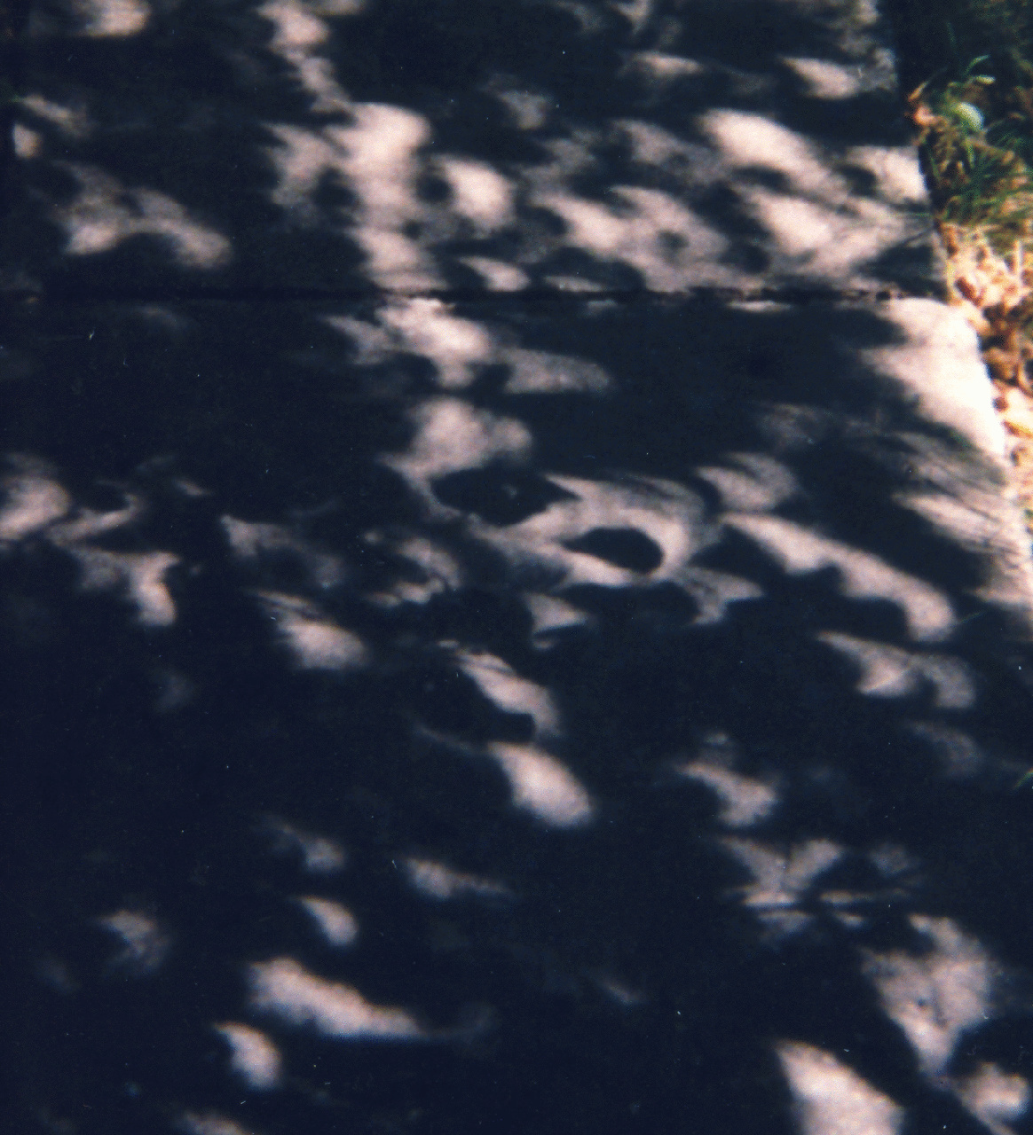 Päikeselaigud pargipuude all päikesevarjutuse ajal.